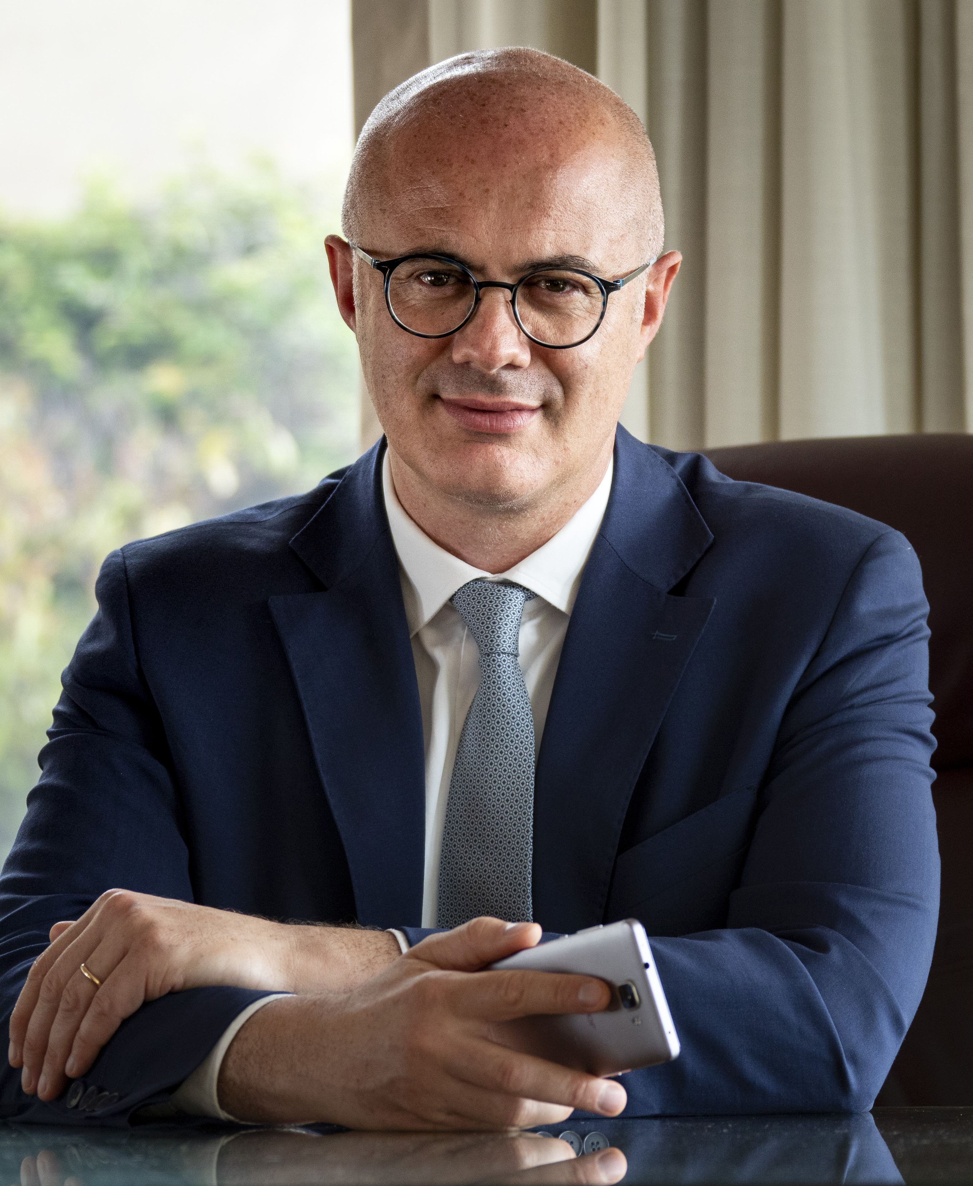 ritratto frontale del ministro per i rapporti con il parlamento governo Conte II Federico D'Incà